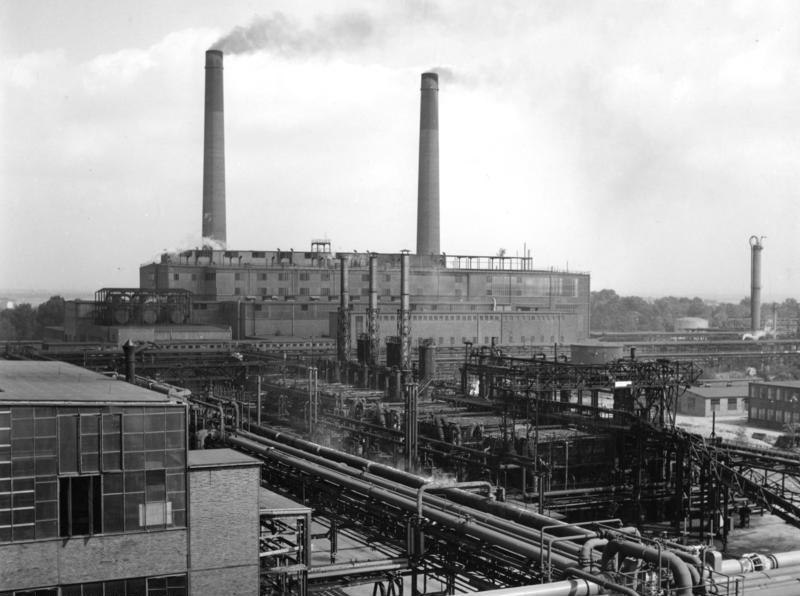 August 1953 Union-Kraftstoffwerk Wesseling bei Bonn Blick von Bau 45 auf Kraftwerk